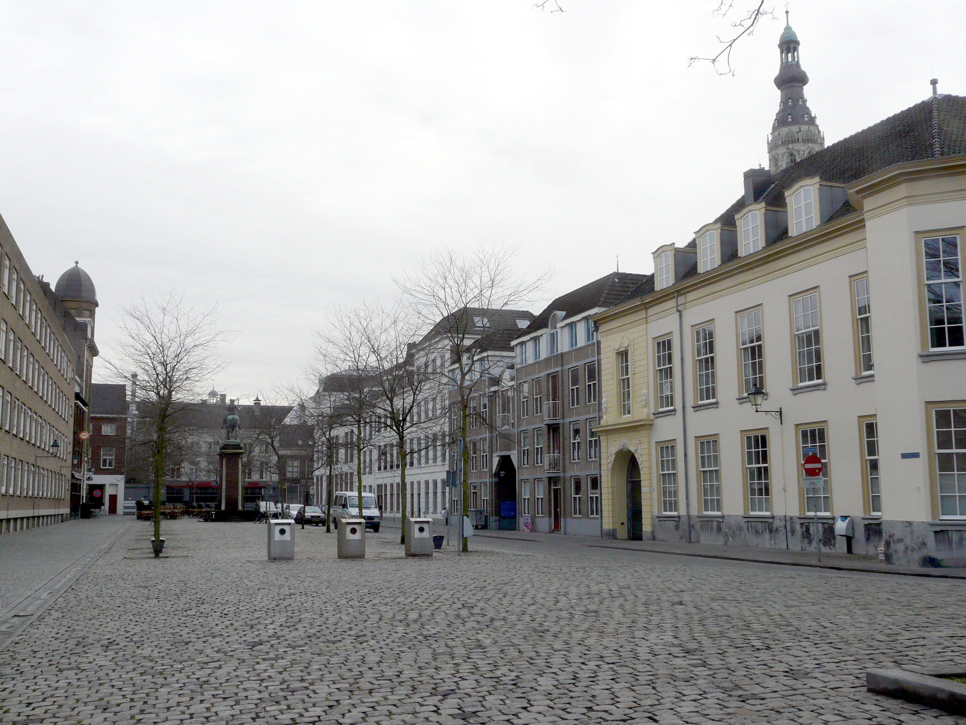 Zicht op een deel van het Kasteelplein in het centrum van Breda